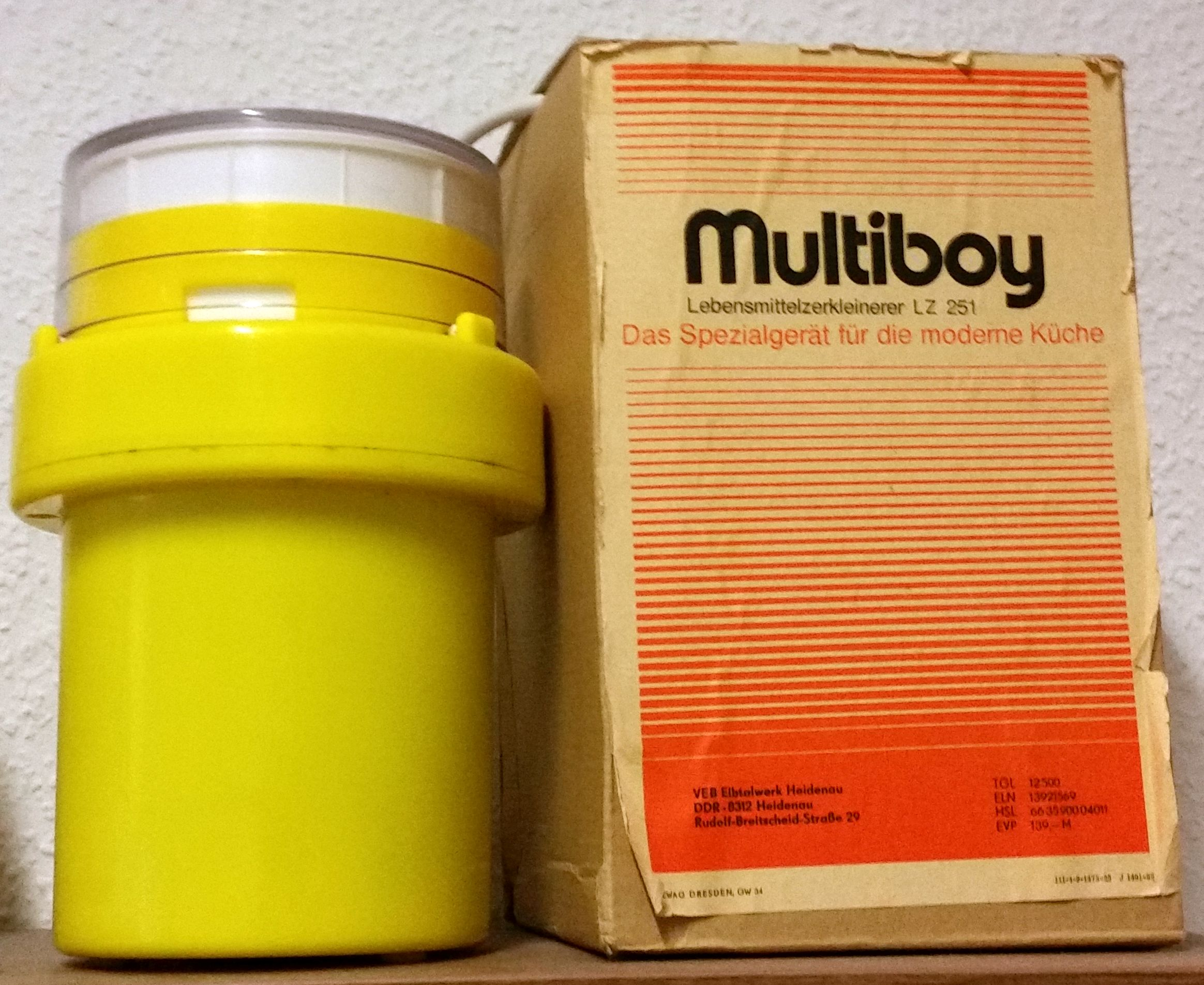 Multiboy Lebensmittelzerkleinerer LZ 251, herbestellt im Elbtalwerk Heidenau im VEB Kombinat Elektromaschinenbau Dresden; ausgestellt im DDR-Museum Pirna